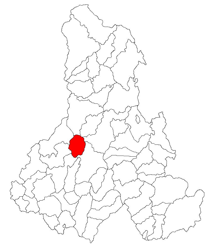 Categorie:Hărţi ale judeţului Harghita Contents 1 Licensing 2 Sursă 3 Licensing 4 Original upload log Licensing Sursă ro::Imagine:Harta_jud_Harghita.png